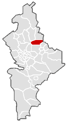 Ubicación geográfica del municipio de Agualeguas en el estado mexicano de Nuevo León.